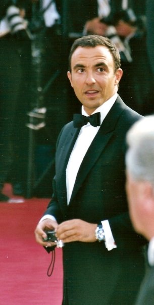 Nikos Aliagas au festival de Cannes.